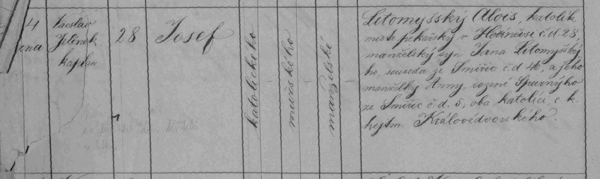 matriční zápis o narození Josefa Jana Litomiského, matrika N 1886-1915 Hořiněves SOA Zámrsk (polovina dochovaného zápisyu)